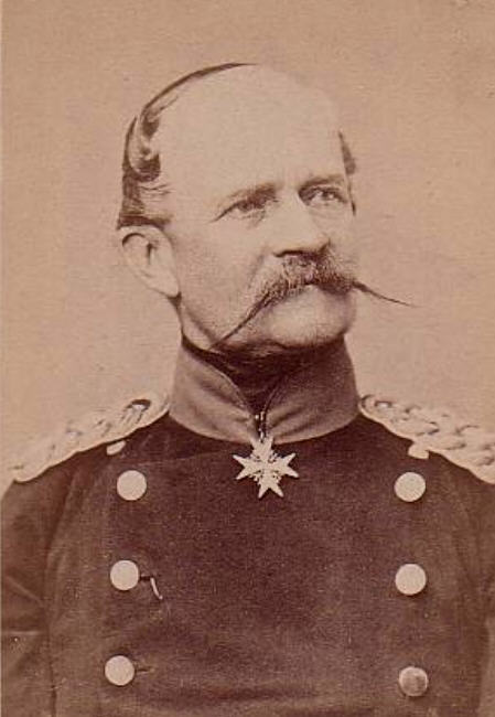 August von Württemberg (* 24. Januar 1813 in Stuttgart; † 12. Januar 1885 in Zehdenick)